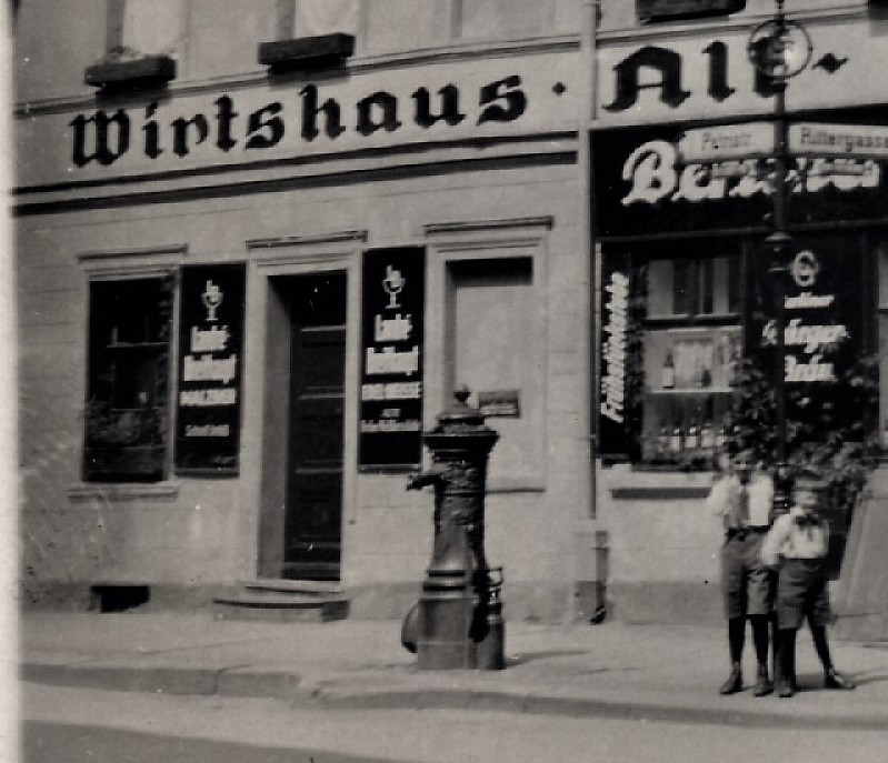 Die Aufnahme in Berlin-Mitte (Postbezirk SW =Südwest) mit dem Wirtshaus "Alt-Berlin" zeigt vor dem Hause einen Rohrbrunnen, wie sie in Berlin und Berliner Vororten aufgestellt waren. Die Ansicht stammt von 1925. Das Haus Petrigasse 22/ Ecke Rittergasse in Berlin SW 19 gehörte den Schraderschen Erben und wurde von Schankwirt K. Riedel verwaltet. (Berliner Adressbuch 1925, IV. Teil Seite 740, #5482). Die Ritterstraße ist in Berliner Adressbuch 1925, IV. Teil Seite 810, #5551 beschrieben. Die Darstellung auf dem Straubeplan IIIA von 1910 findet sich auf mit dem Stichwort Friedrichsgracht oder Fischerinsel 6. Mit der Verzierung des Brunnenkörpers im oberen Bereich ist es ein Greiner-Brunnen vom Typ I.